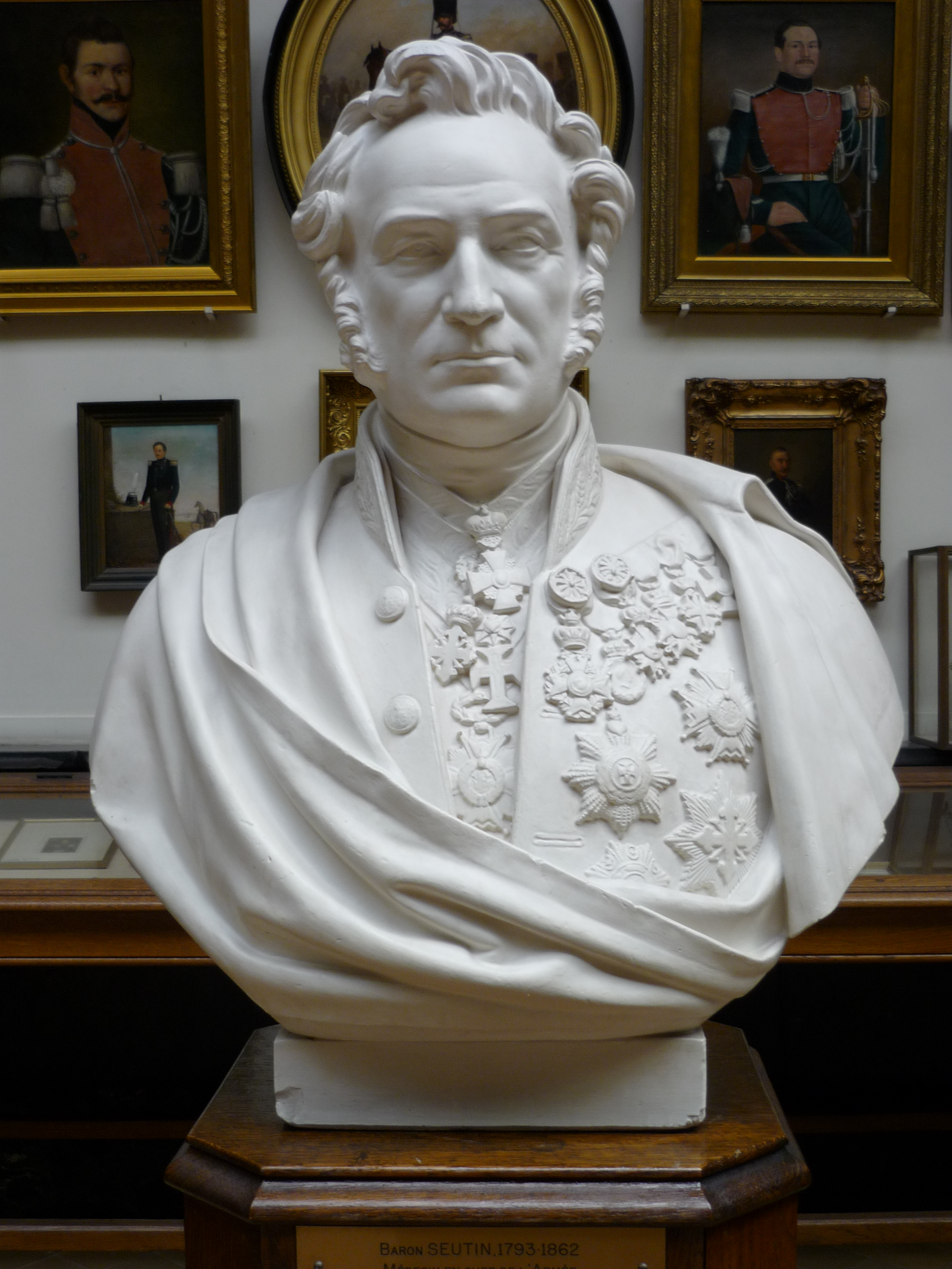 Buste de Louis Seutin, Musée du Cinquantenaire, Bruxelles, Belgique. Royal Museums of Art and History Native nameMusées royaux d’art et d’histoireLocationBrusselsCoordinates50° 50′ 25.85″ N, 4° 23′ 35.37″ E Established1835Website